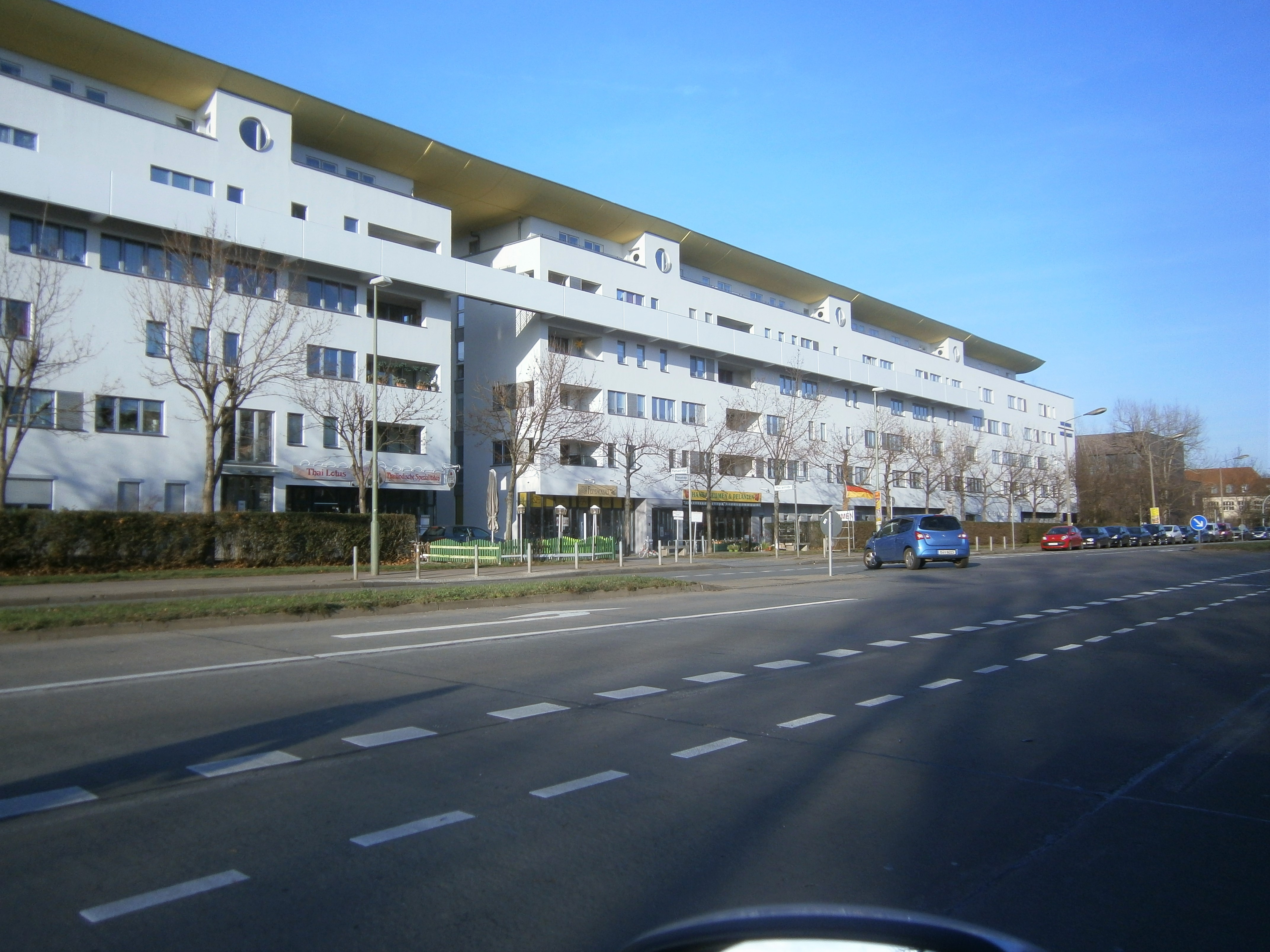 Die Hansastraße ist eine Berliner Straße mit übergeordneter Bedeutung in den Ortsteilen Alt-Hohenschönhausen und Weißensee. Sie liegt zwischen der Indira-Gandhi-Straße und der Großsiedlung Hohenschönhausen-Nord. Im Bild das Wohnquartier Hansastraße 65–149 an der Westseite aus den Jahren 1991/1994.